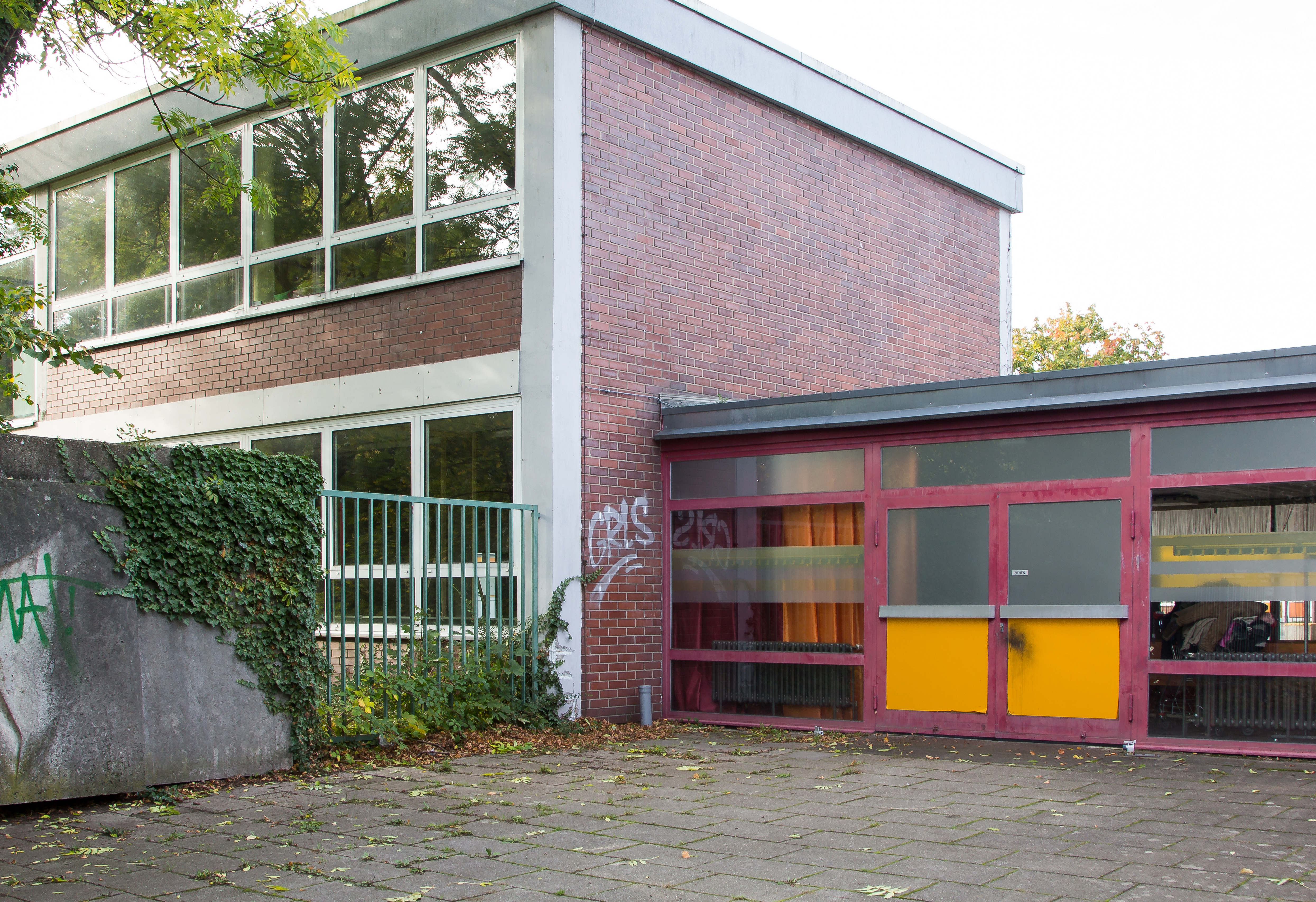 Ehemalige Gemeinschaftshauptschule Holzheimer Weg 34, 50769 Köln (Worringen) Eingang Holzheimer Weg